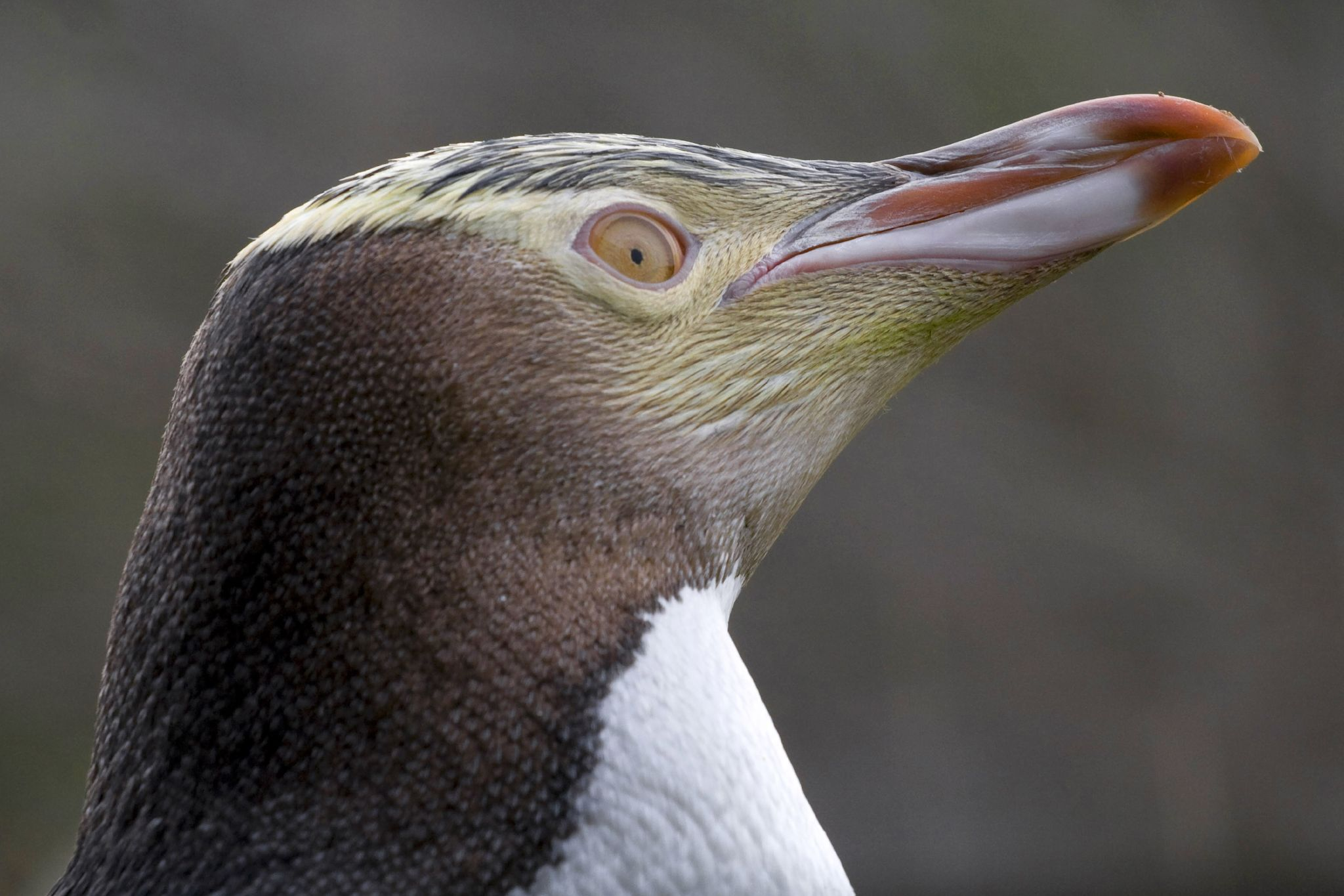 Penn ur mank lagad aour.